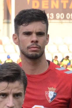 CSC_0149